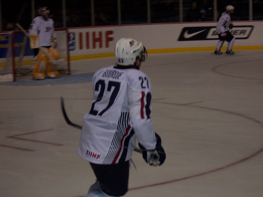 Chris Bourque in IIHF WJHC 2006